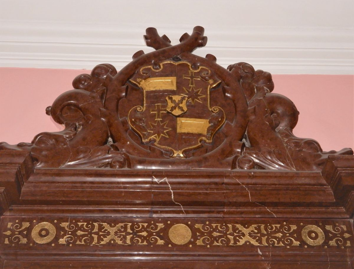 Erb arcibiskupa Zbyňka Berky z Dubé v nadpraží vchodu do kaple Arcibiskupského paláce v Praze